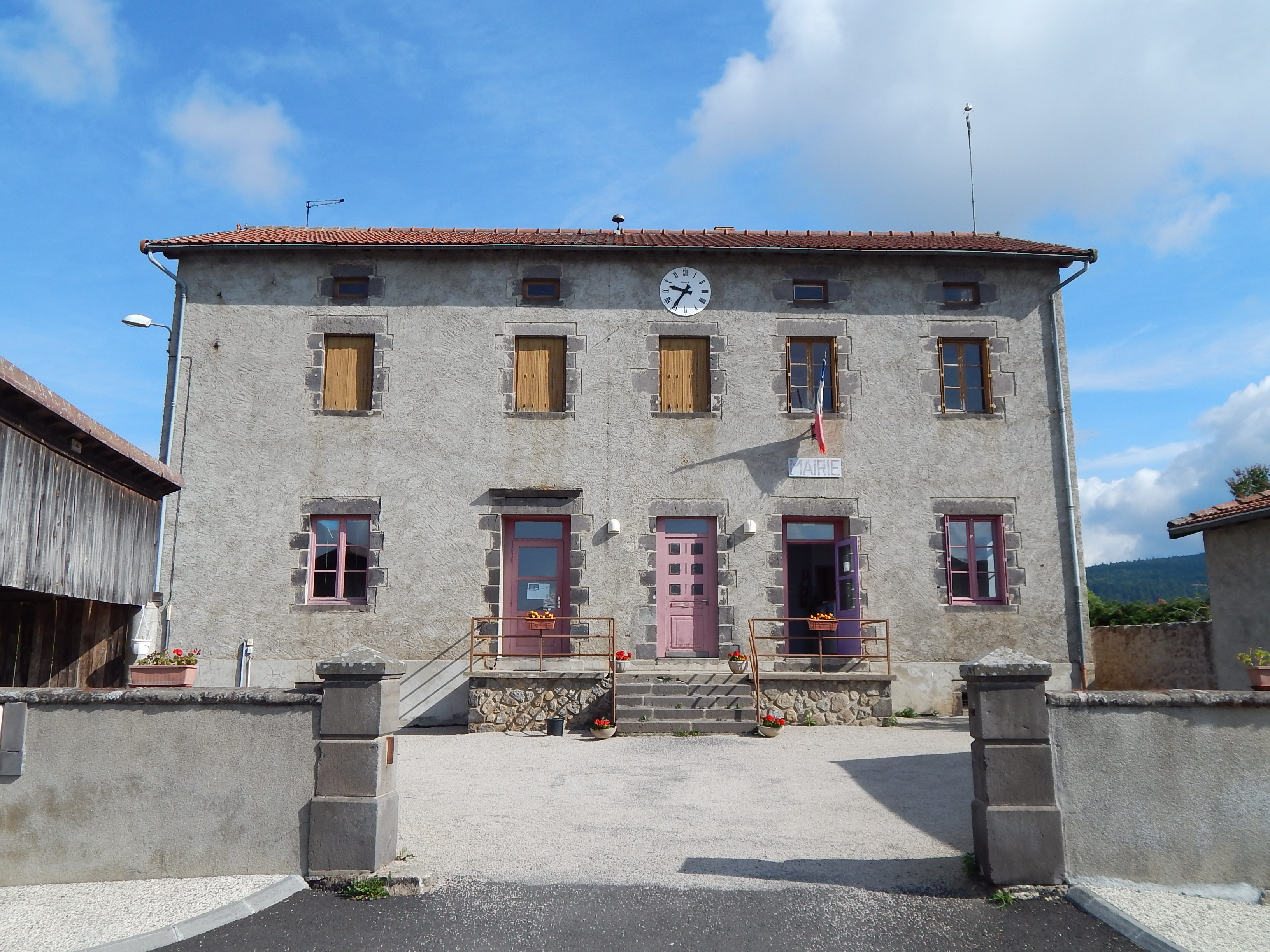 Mairie de Collat